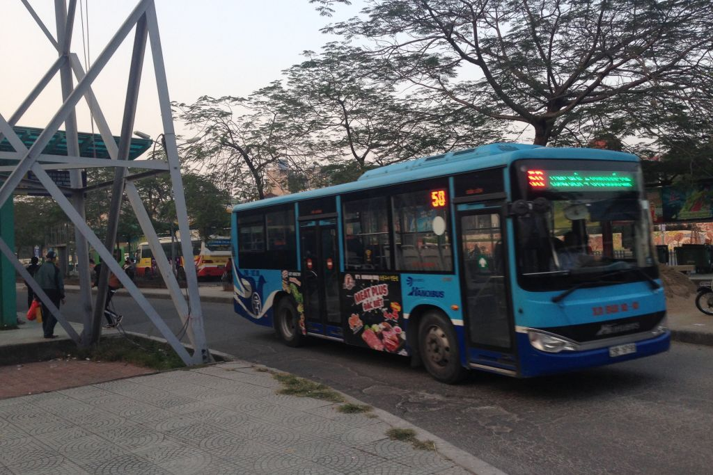 Hanoibus 50 (Long Biên - SVĐ Mỹ Đình)